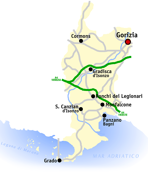 Kaart van de provincie Gorizia